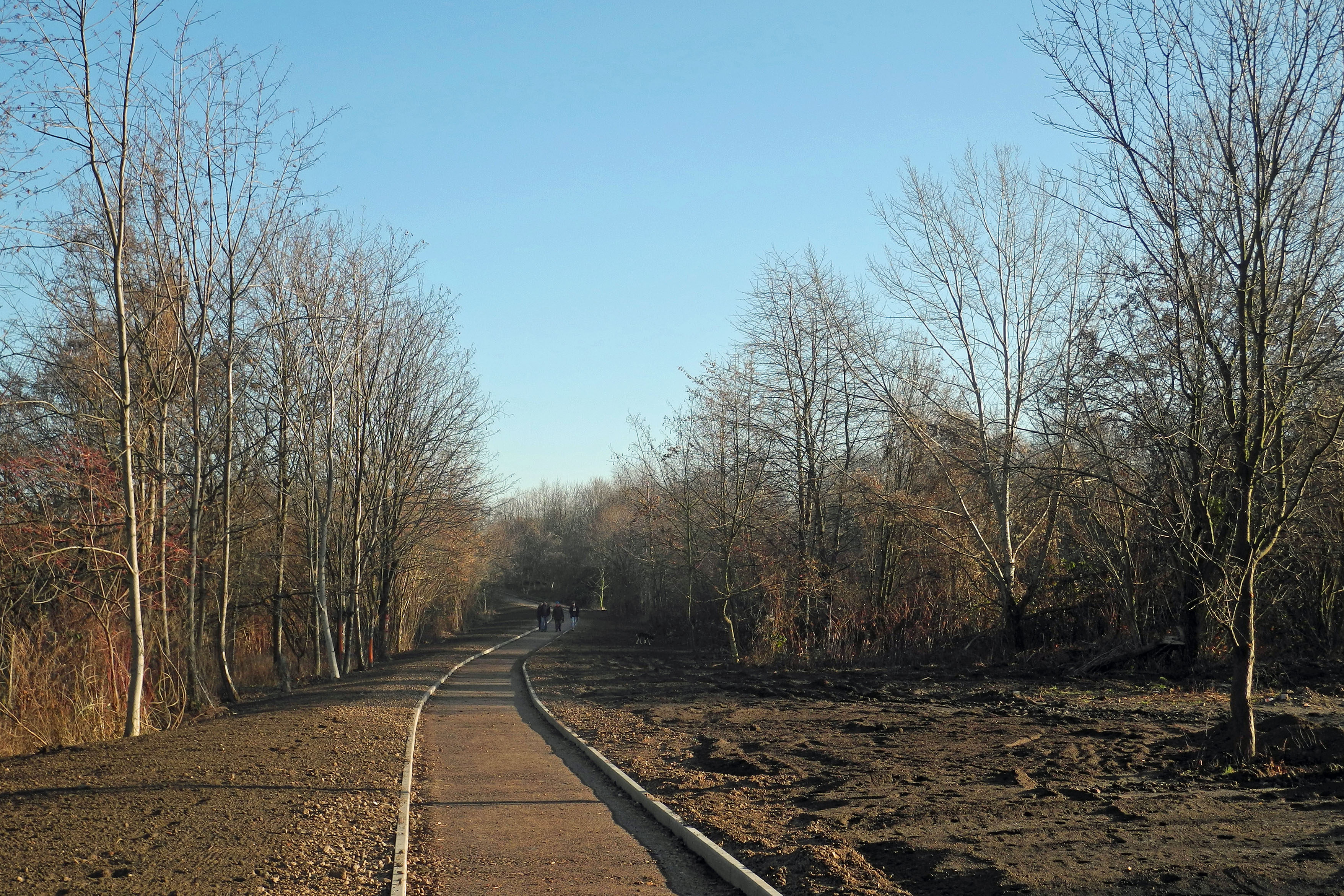 Der neue Südpark in Dresden, Passauer Str. / Nöthnitzer Str. (z. Z. noch im Aufbau befindlich) - künftige Ost-West-Achse.